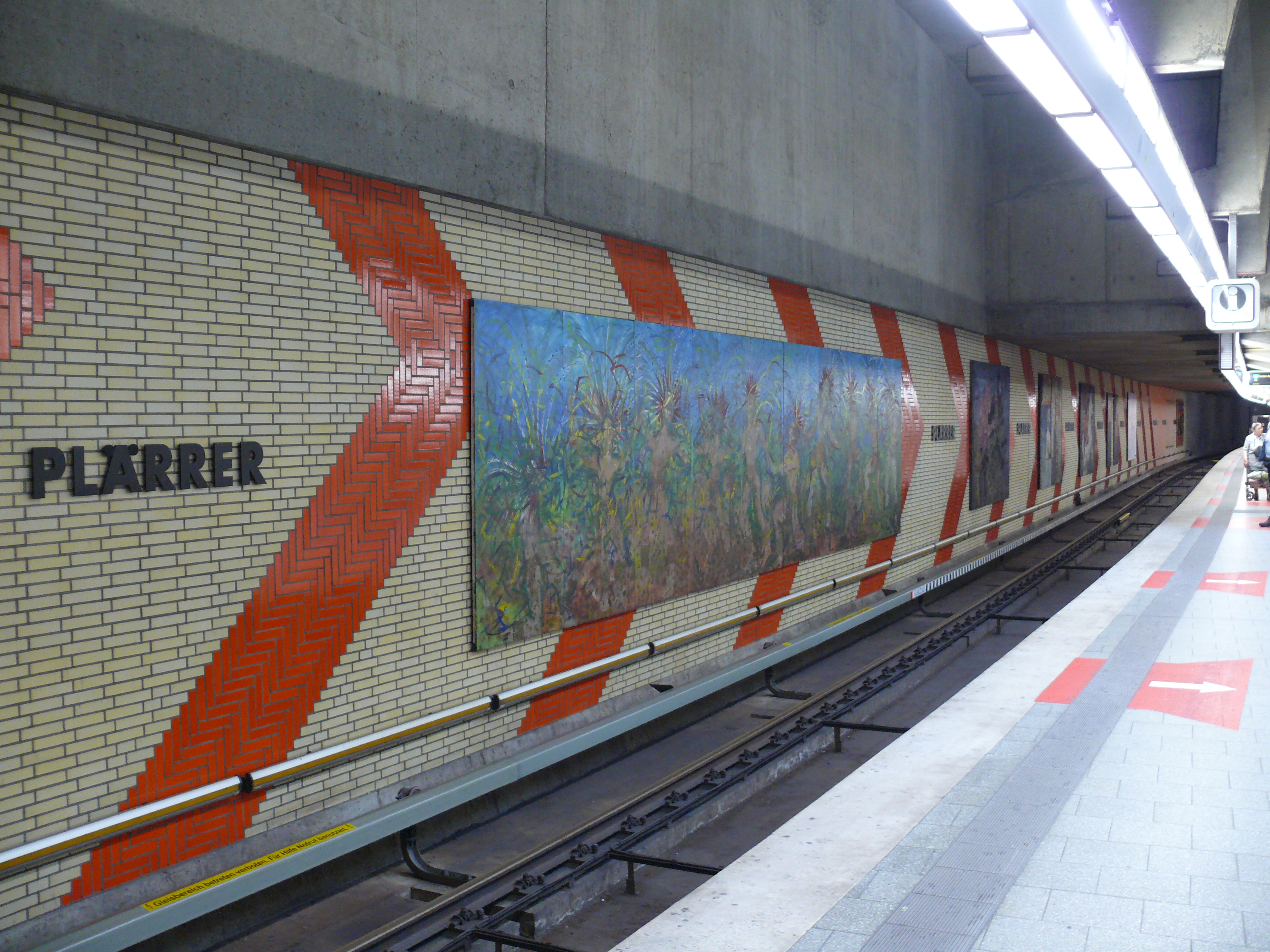 Malereien an den Bahnsteigwänden am U-Bahnhof Plärrer in Nürnberg.